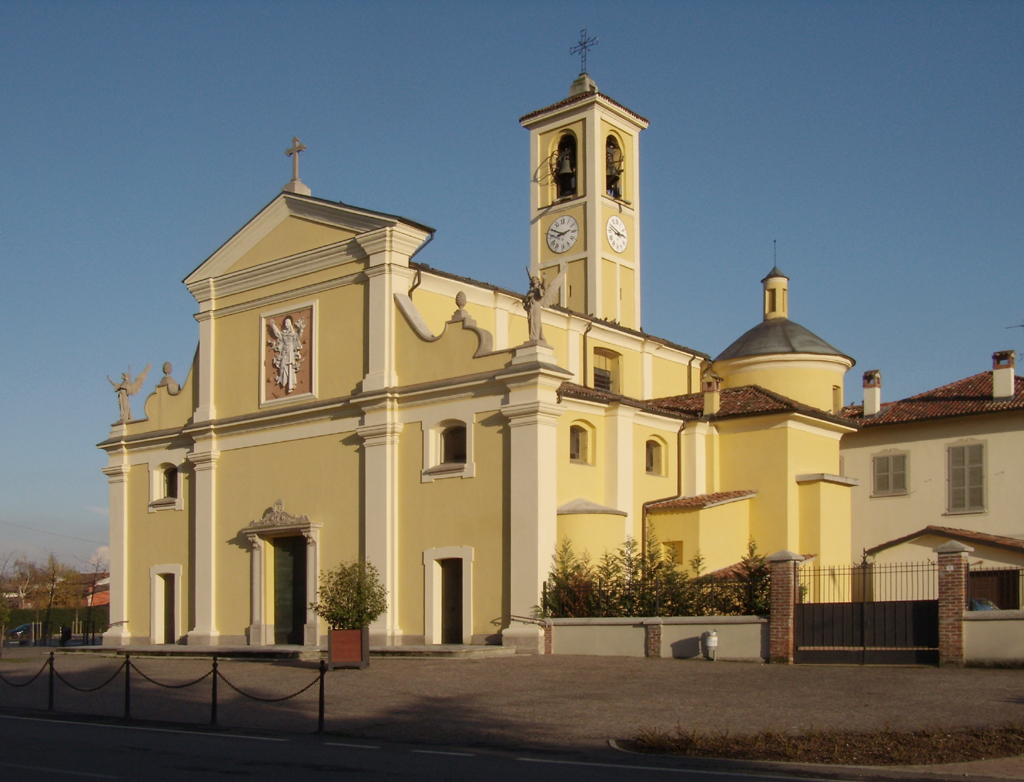 La chiesa parrocchiale di Sant'Andrea Apostolo a Pieve Fissiraga